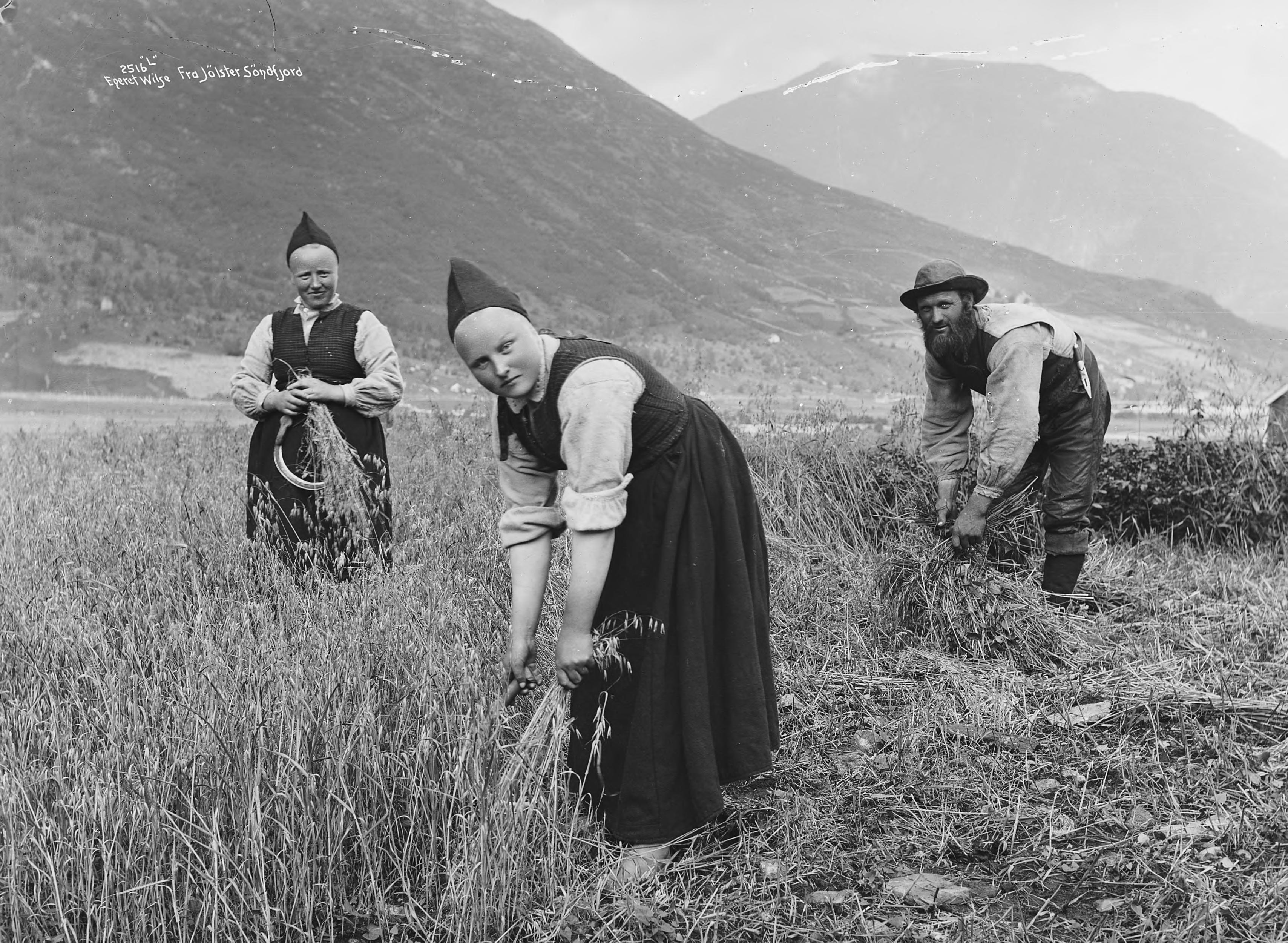 Havreskjering på Fossheim i Jølster